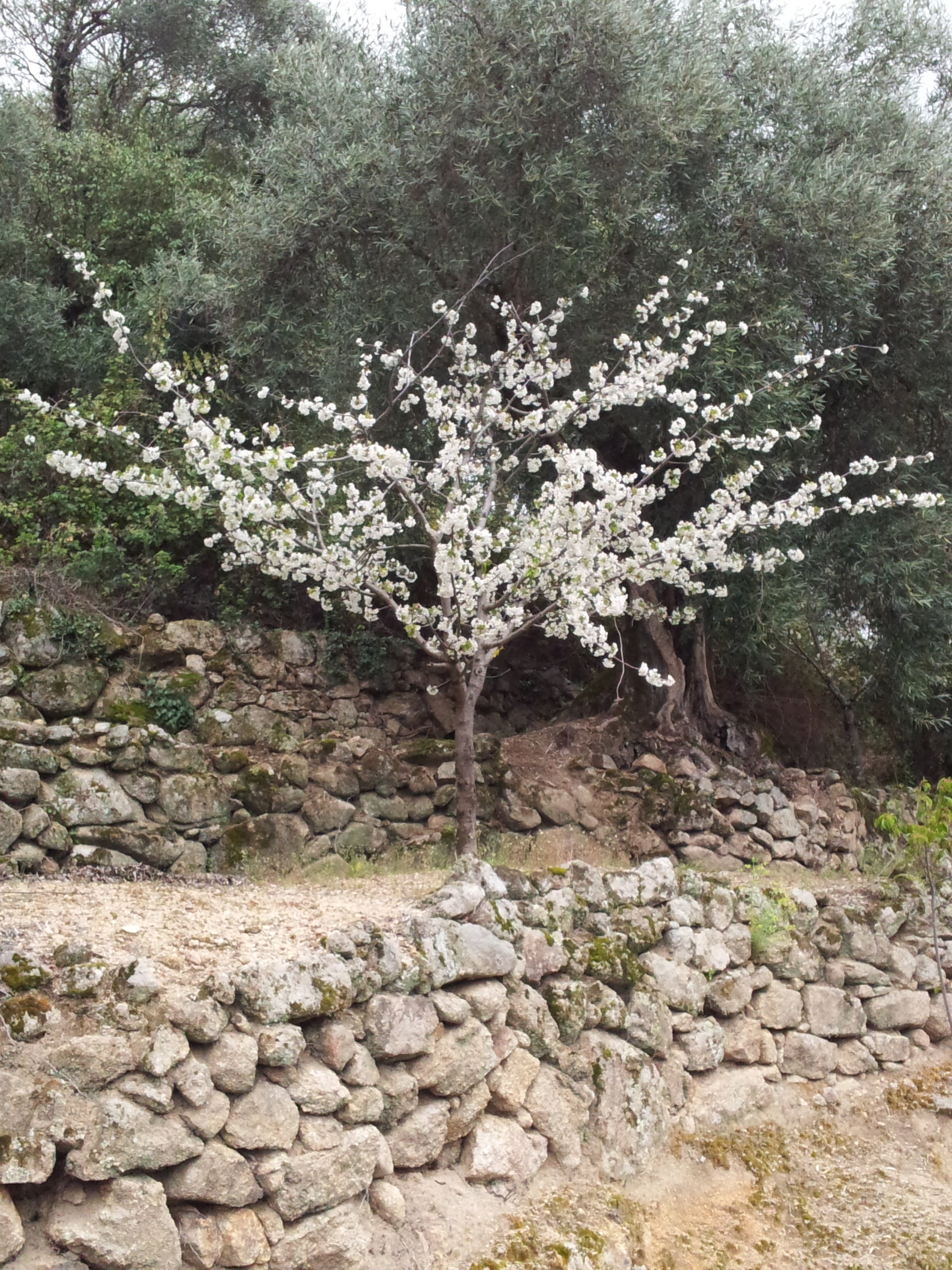 Las Casas del Conde. Cultivo en terrazas donde coinciden el cerezo, la vid y el olivo.